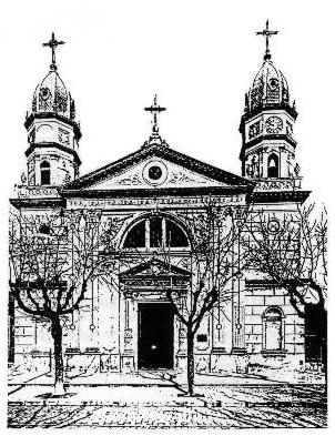 Antigua iglesia de Jesús Amoroso (San Martín, Buenos Aires) Construida en 1873, fue demolida en 1979.